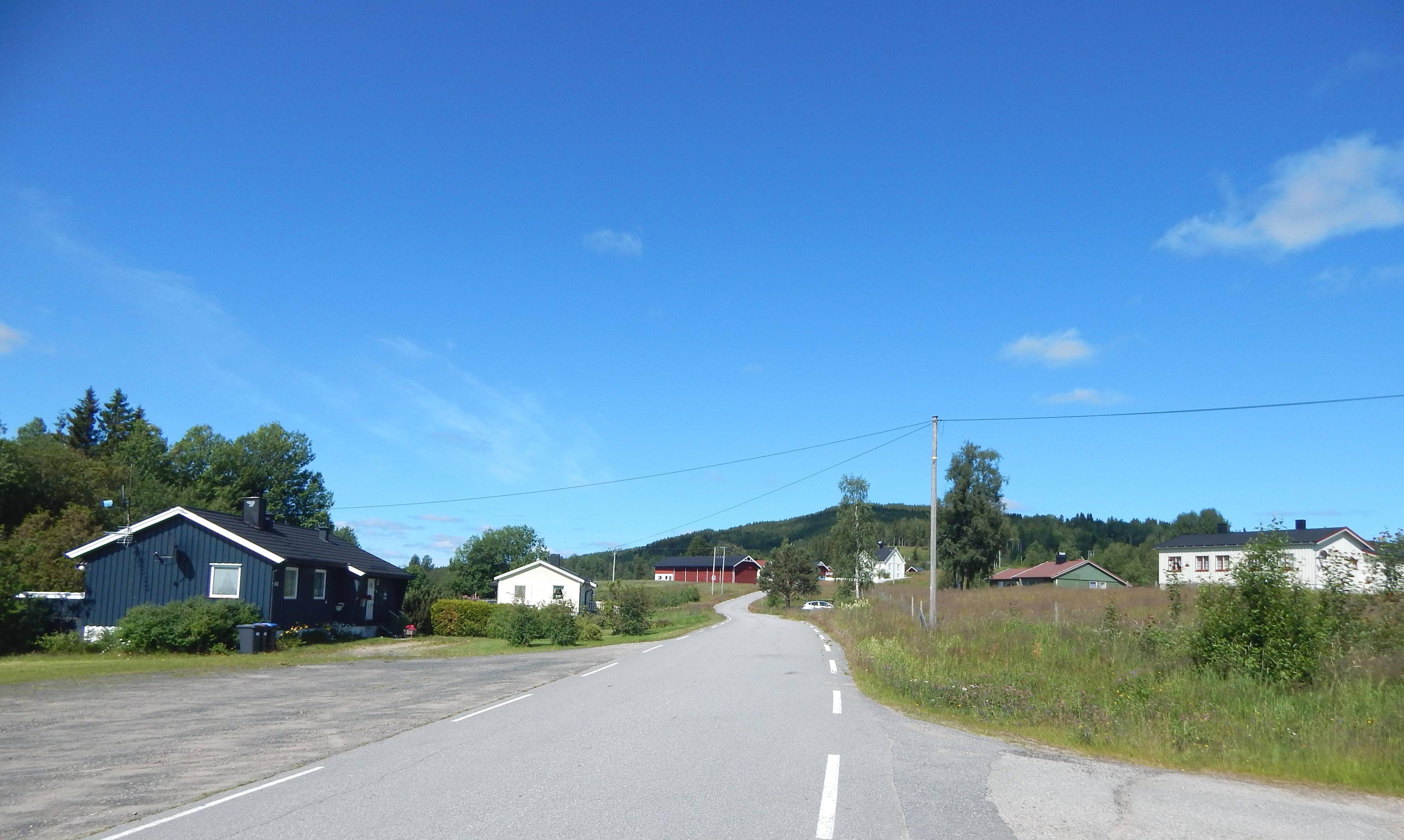 FV461 gjennom bygdesentrumet i Gravberget